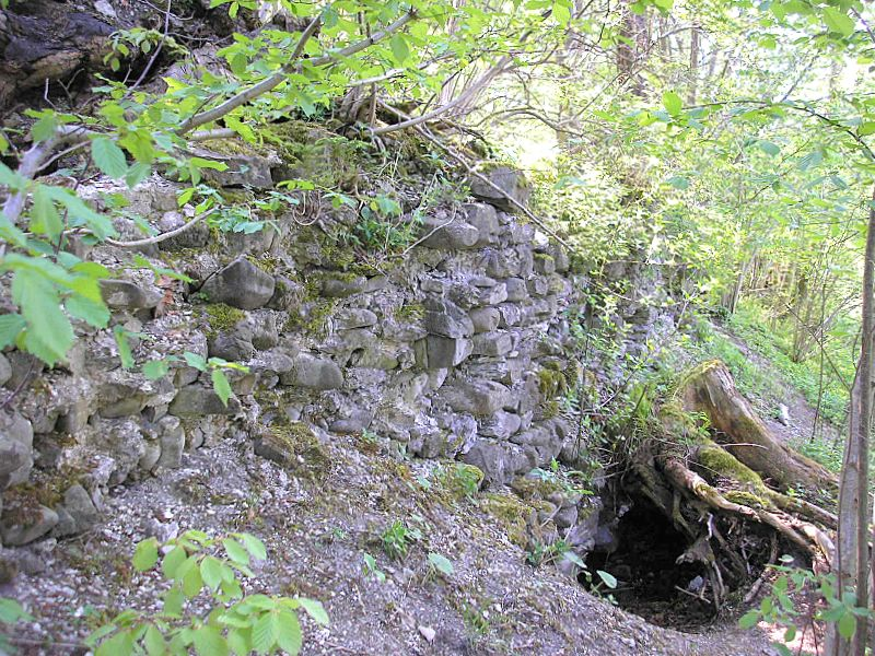 Burg Neuenburg bei Durach (Landkreis Oberallgäu, Bayerisch-Schwaben). Mauerreste im Südwesten der Hauptburg. Eigene Aufnahme, Mai 2008 / Neuenburg castle near Durach (Landkreis Oberallgäu, Bavaria, Germany). Ruins at the south western part of the central castle. Own photo, May 2008